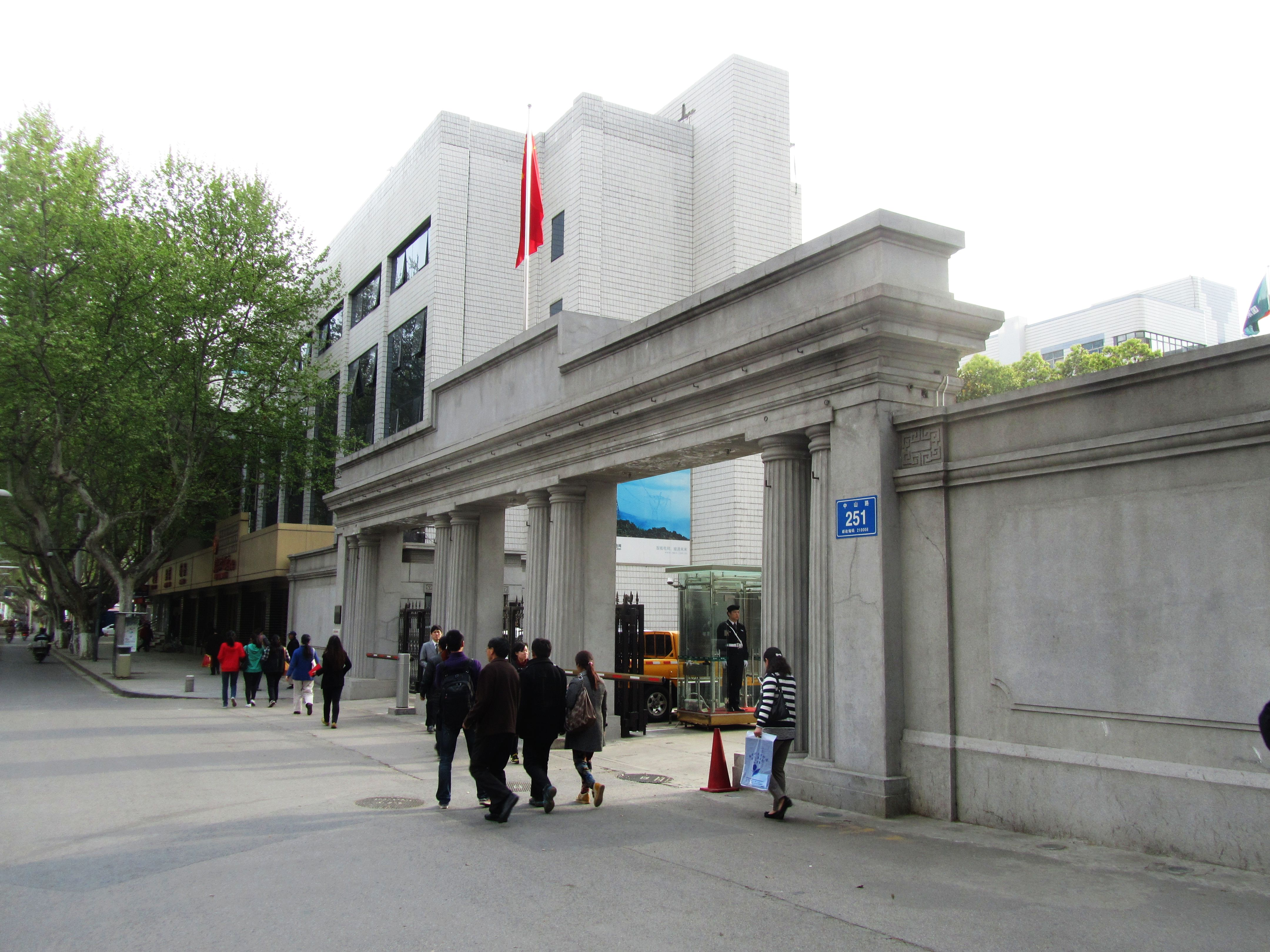 南京原国民政府司法部大门旧址。